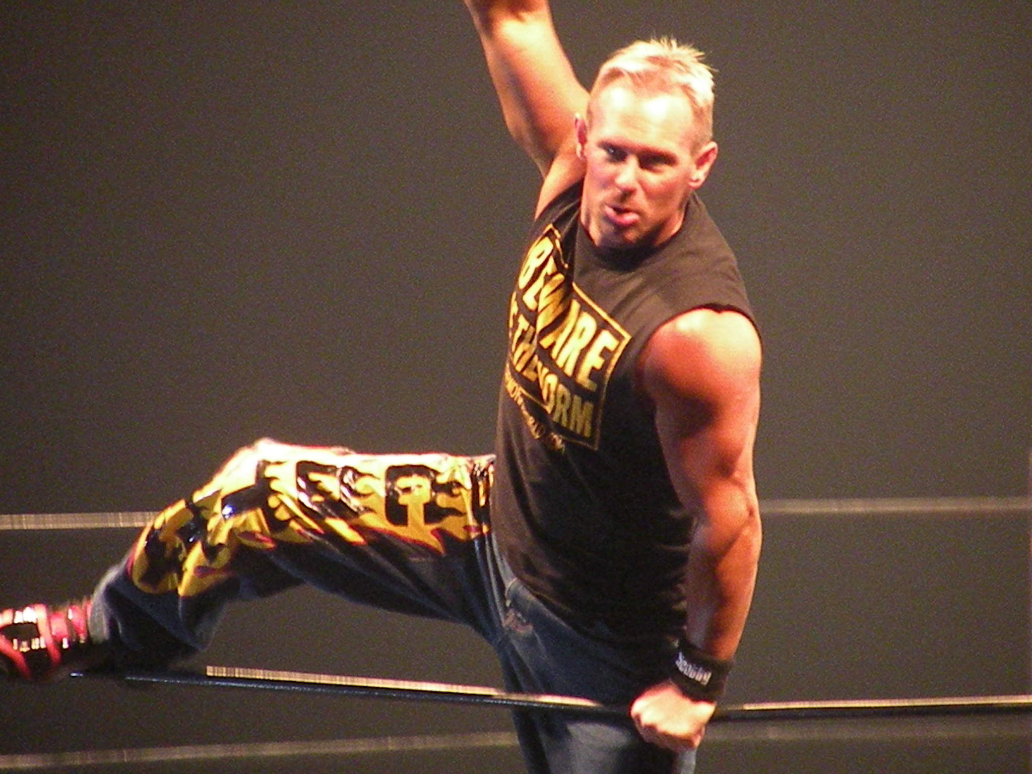 catcheur scotty too hotty a american wrestling rampage 2009 paris